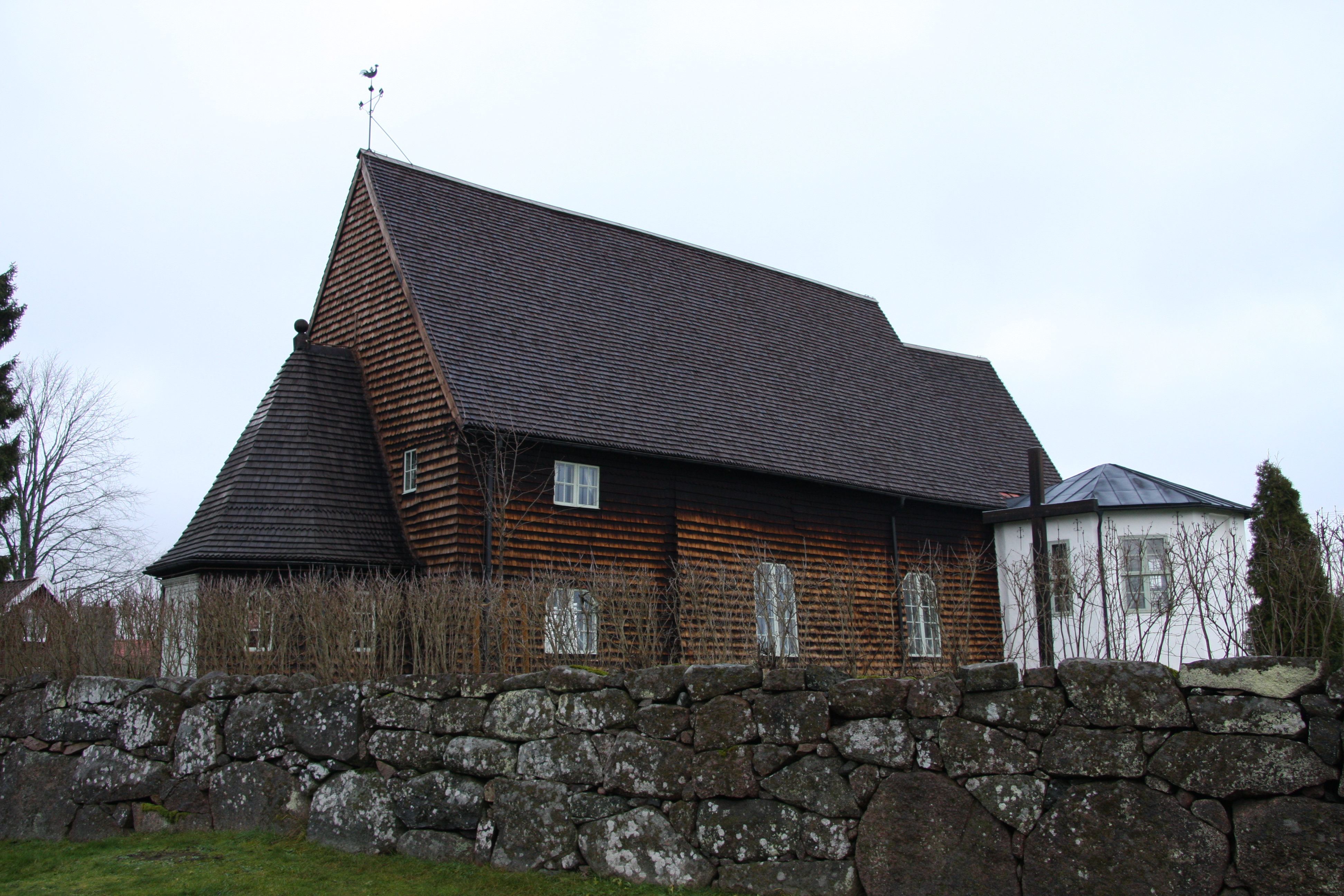 Detta är Pelarne kyrka